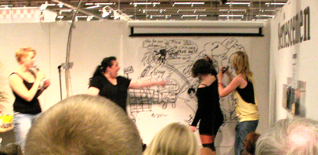 Seriebattle på Bok & Bibliotek, september 2011. Jenny Berggrund och Lisa Medin "battlar", under överinseende av konferenciererna Fanny M. Bystedt och Yvette Gustafsson.